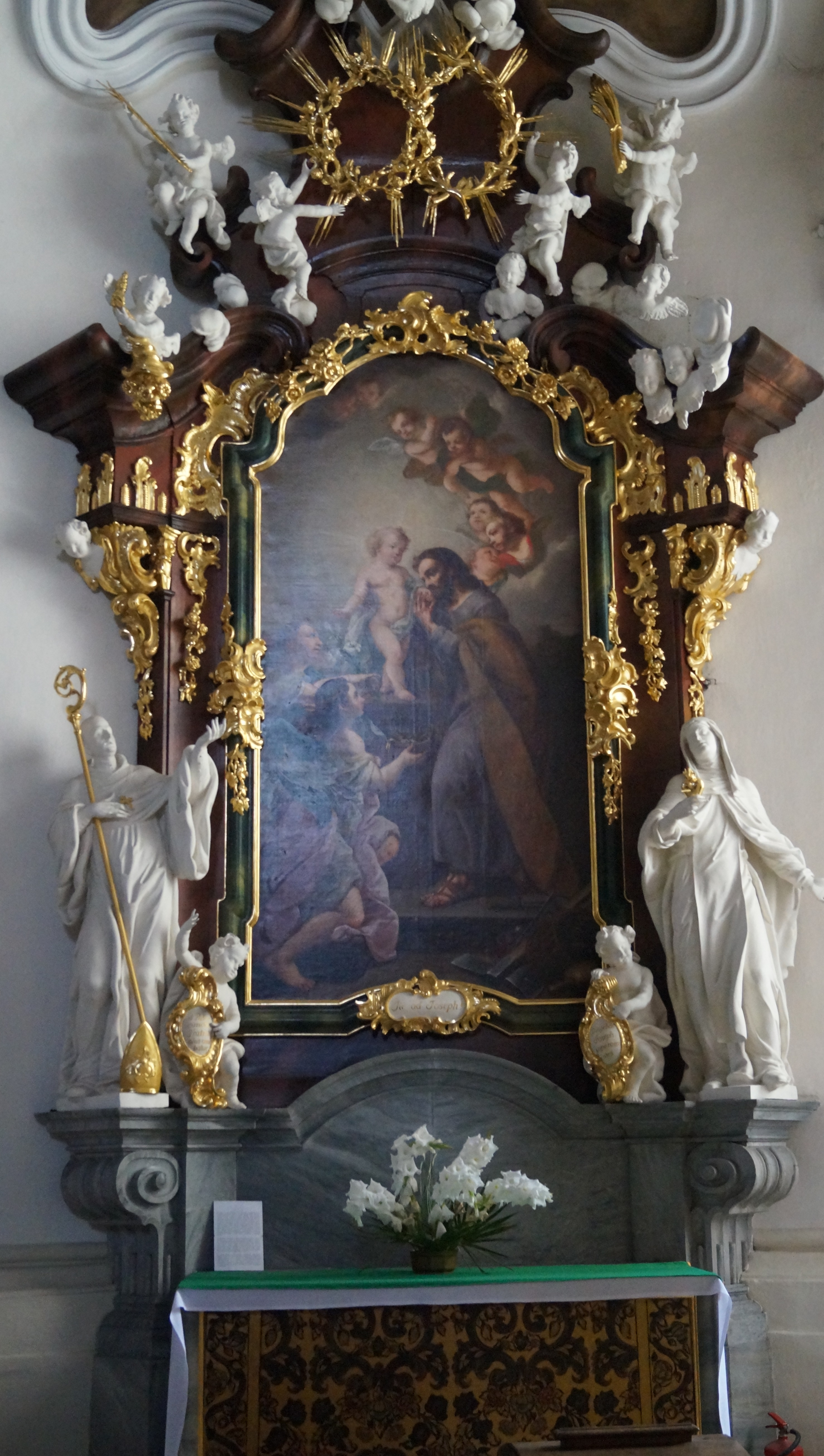 Kloster Grüssau 'Hl. Joseph - Pfleger Jesu' Gemälde von F. A. Scheffler